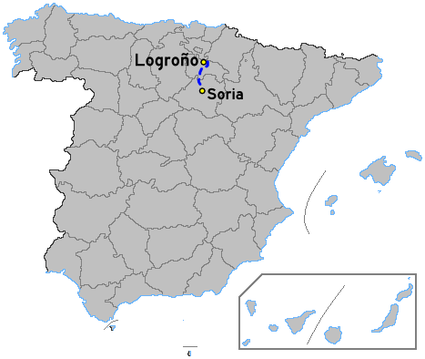 Mapa de la autovia A-13